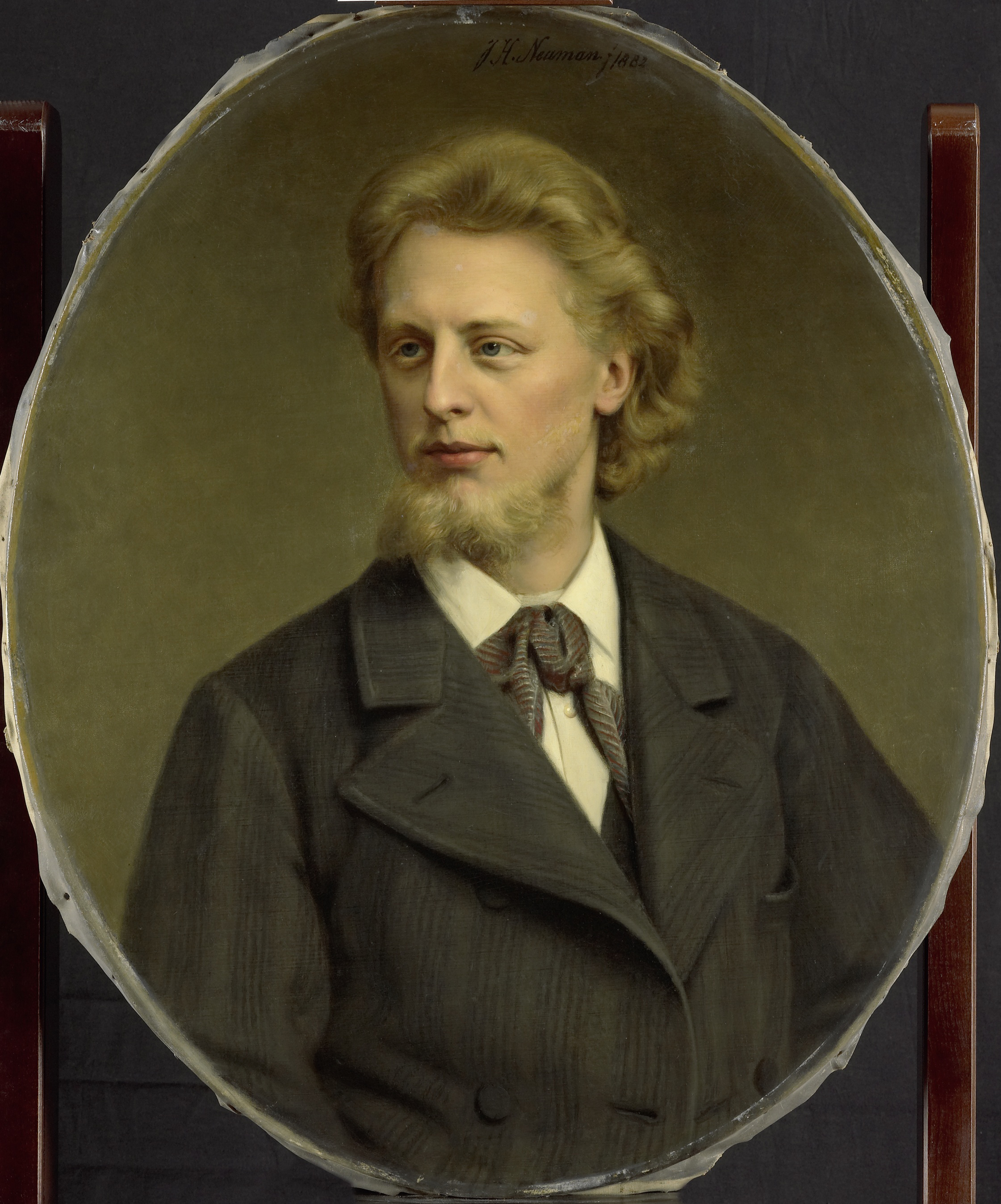 Portret van de dichter Jacques Perk (1859-81). Buste in ovaal, naar een foto van A. Greiner uit maart 1880.